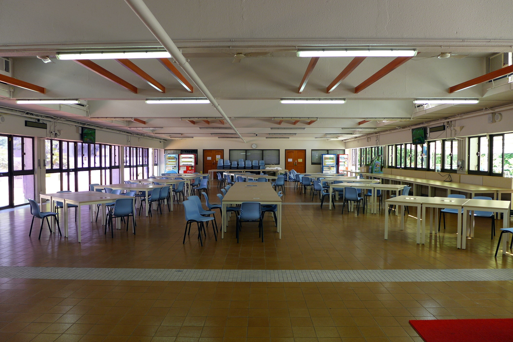 Hang Seng Management College Canteen